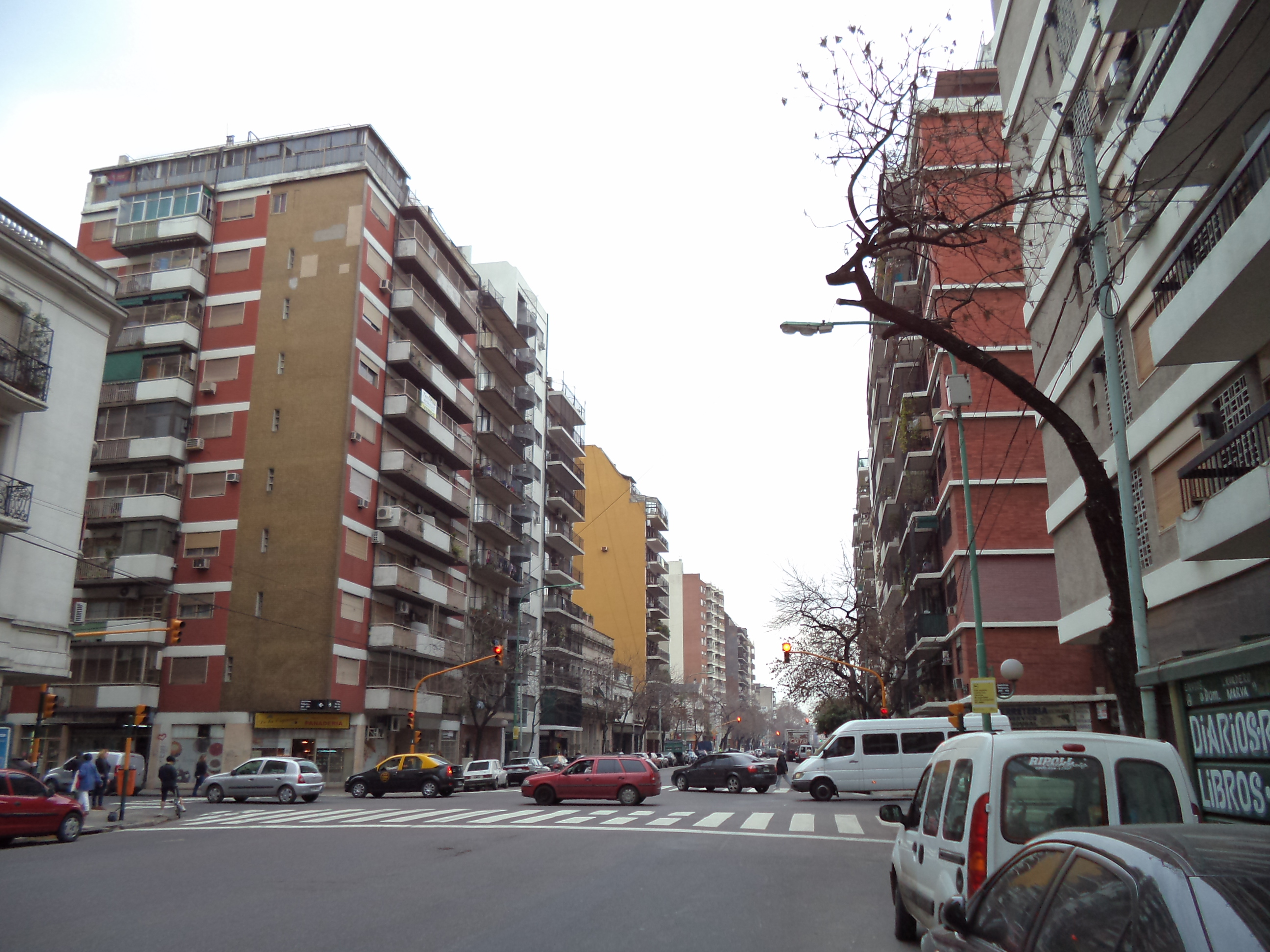 Vista de la Avenida Díaz Vélez desde la esquina de la calle Salguero hacia el este. Buenos Aires.